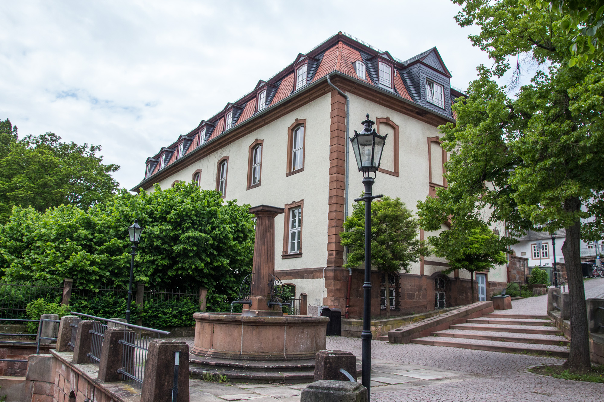 Reithalle der Universität, ehemals Standort der Franziskanerkirche in Marburg